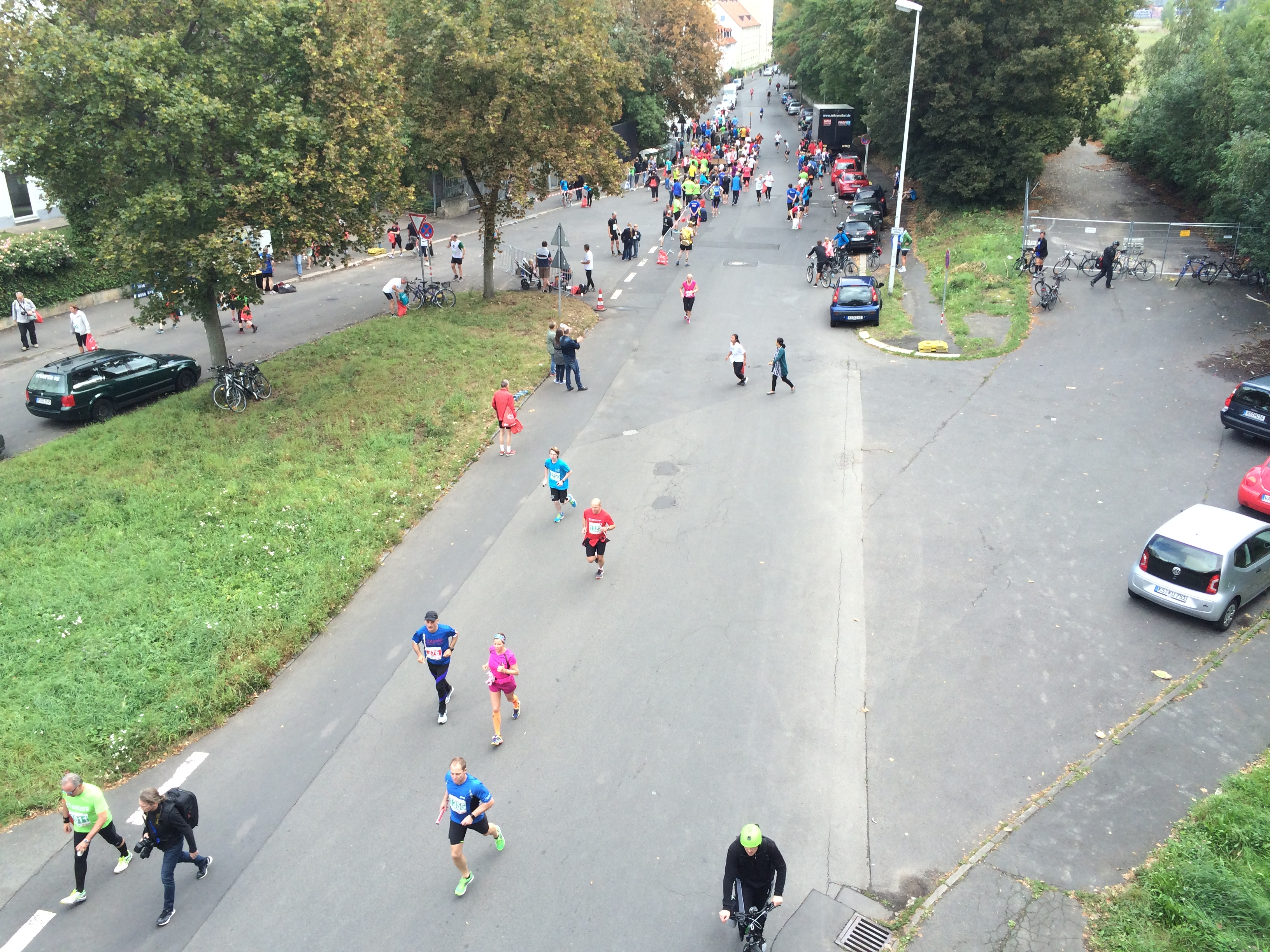 10. E.ON Kassel-Marathon 2016: Staffelwechselpunkt Marathon-Staffel Mombachstraße